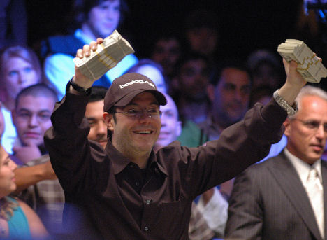 Jamie Gold after winning WSOP 2006.